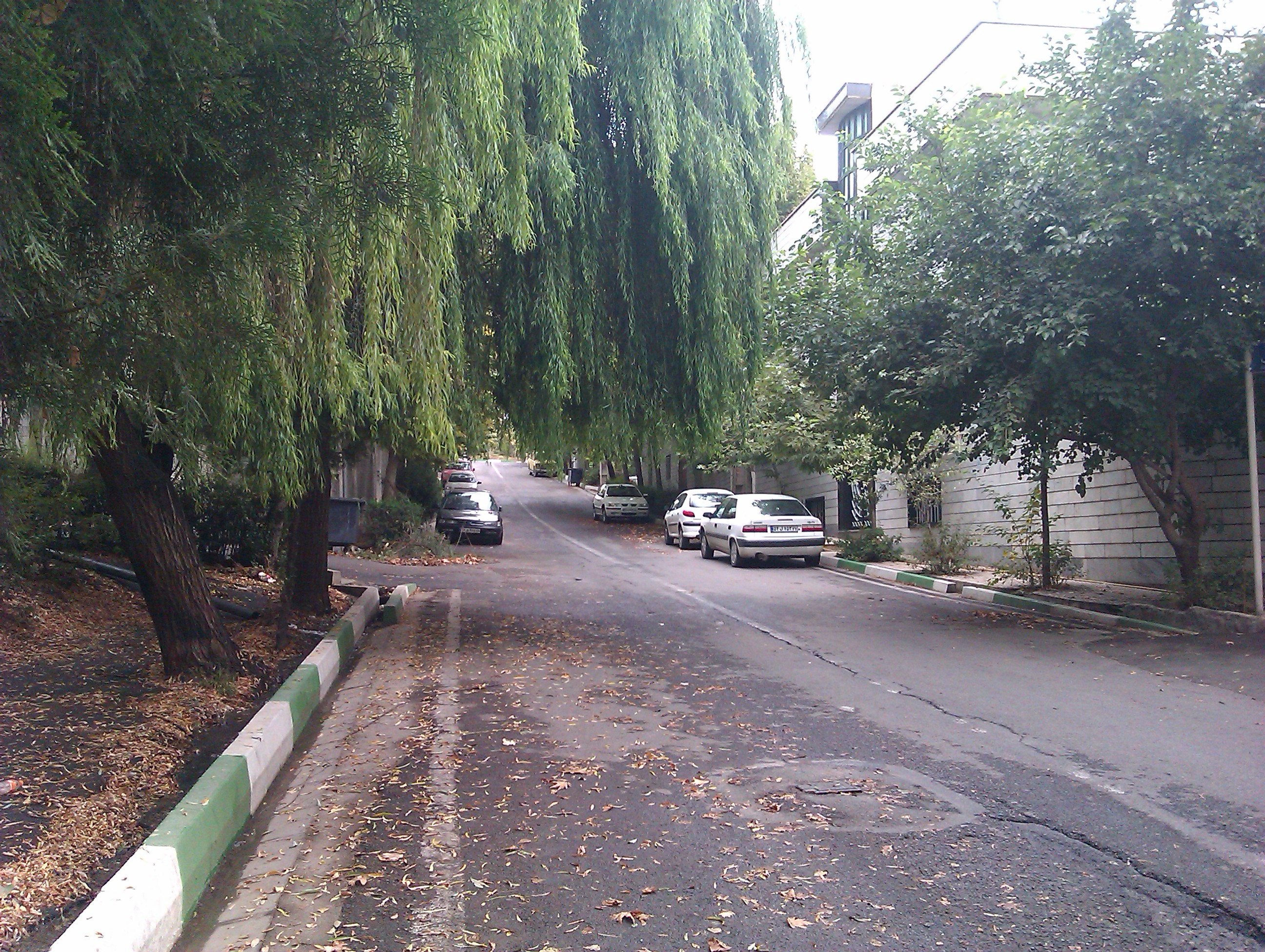 روز بارانی